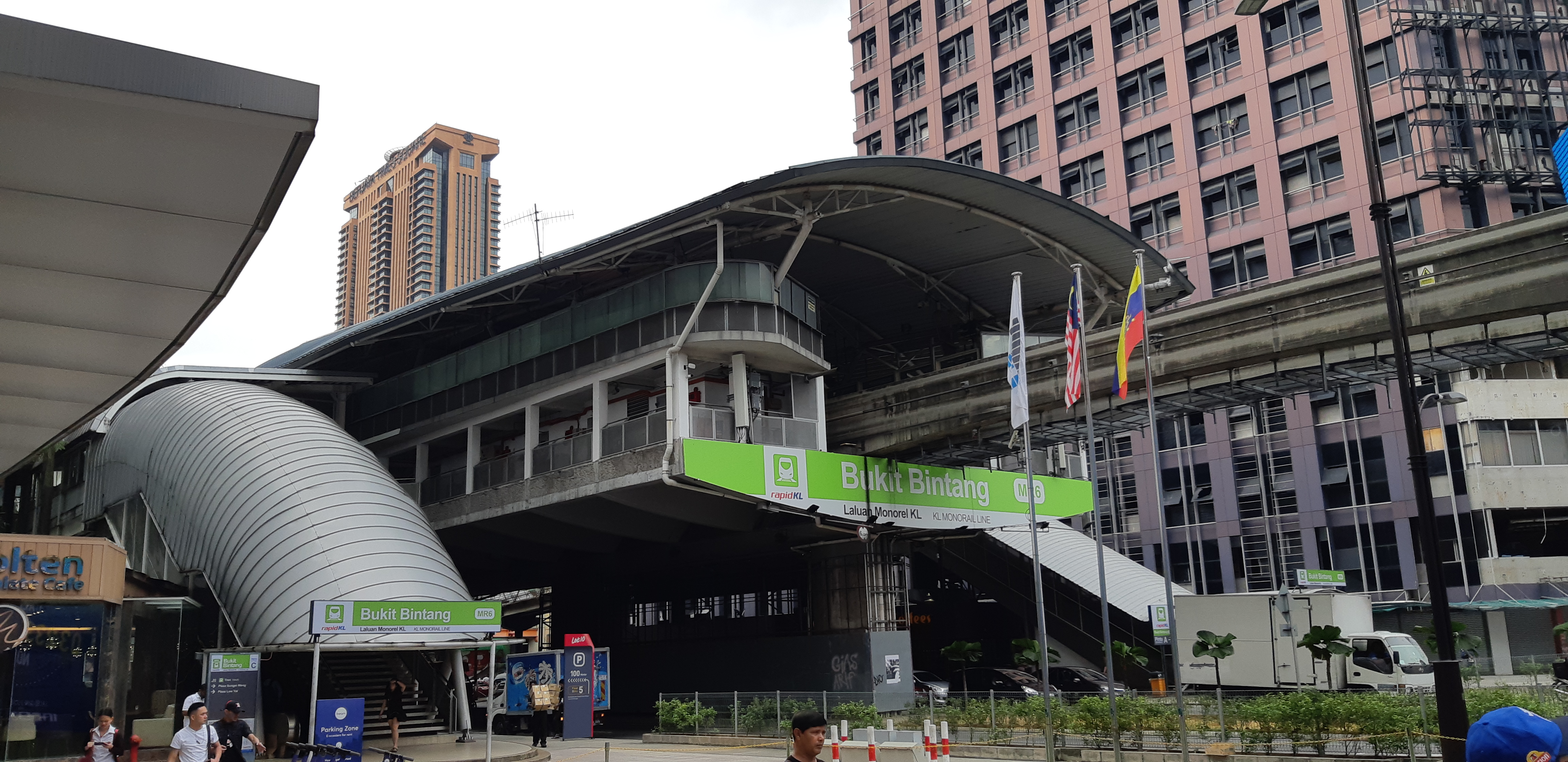 Stasiun Monorel Bukit Bintang